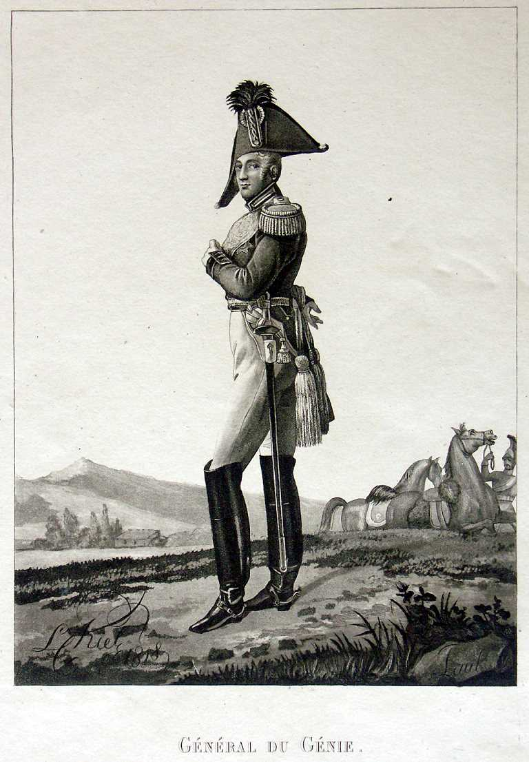 Киль, Лев Иванович; Инжене́р-генера́л эпохи наполеоновских войск.